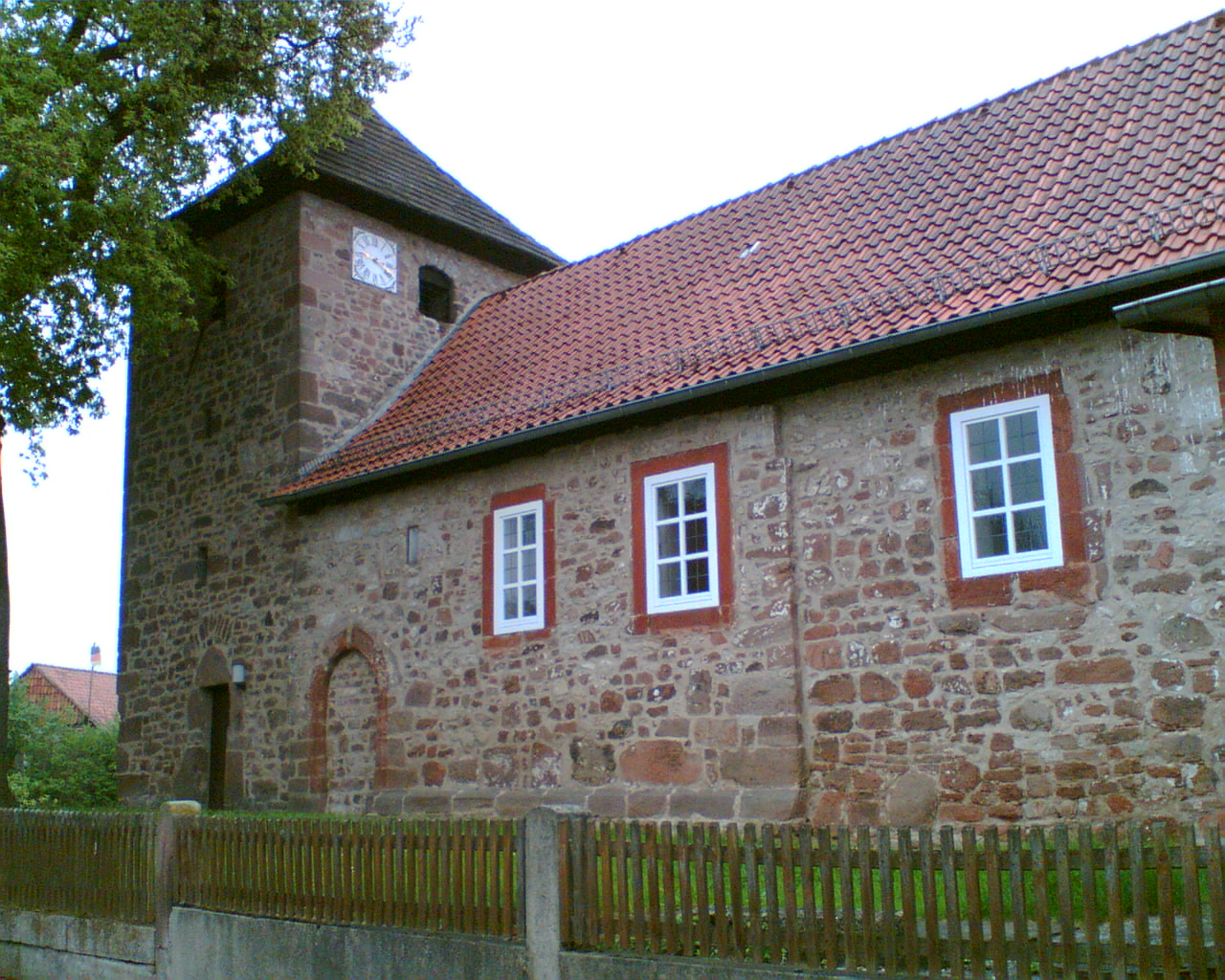 kerk in Vardeilsen